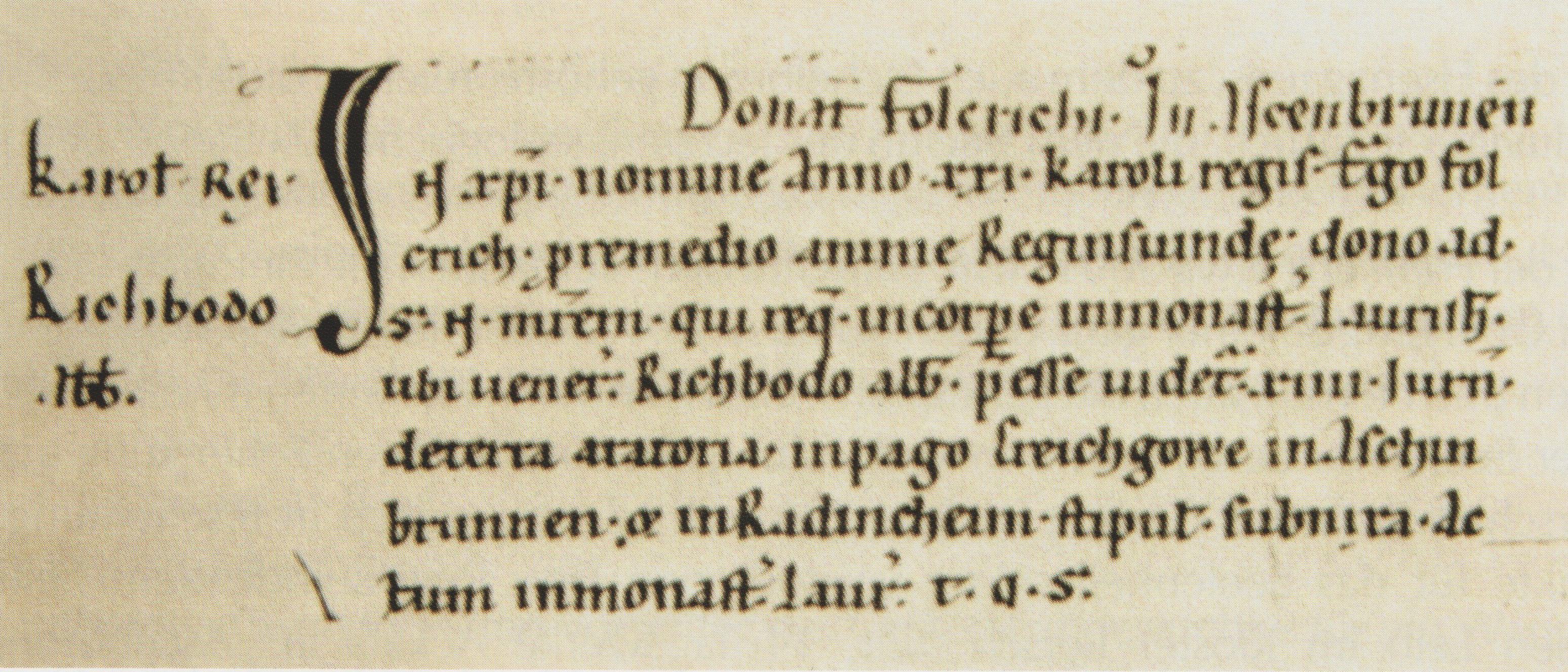 Deed, first document where Eschelbronn is mentioned. URKUNDE 2326 (788 oder 789 – Reg. 2139) Schenkung des Folcrich in Eschelbronn unter König Karl und Abt Richbodo In Christi Namen, im 21. Jahr (9. Oktober 788 bis 8. Oktober 789) des Königs Karl, verwende ich, Folcrich, mich für das Seelenheil der Reginsuint. Ich beabsichtige daher eine Zuwendung an den heiligen Märtyrer N(azarius), dessen Leib in monasterio laurish (amensi = im Lorscher Kloster) ruht, das unter der Aufsicht des ehrwürdigen Abts Richbodo steht. Ich schenke 14 Joch Ackerland in pago Creichgowe (im Kraichgau), gelegen in Aschinbrunen (Eschelbronn n. Sinsheim sö. Heidelberg) und in Radincheim (Rettigheim s. Wiesloch s. Heidelberg). Rechtskräftige Fertigung. Geschehen im Lorscher Kloster. Zeit wie oben.